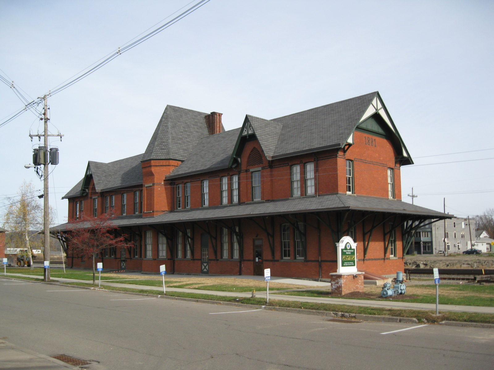 Sayre, Pennsylvania